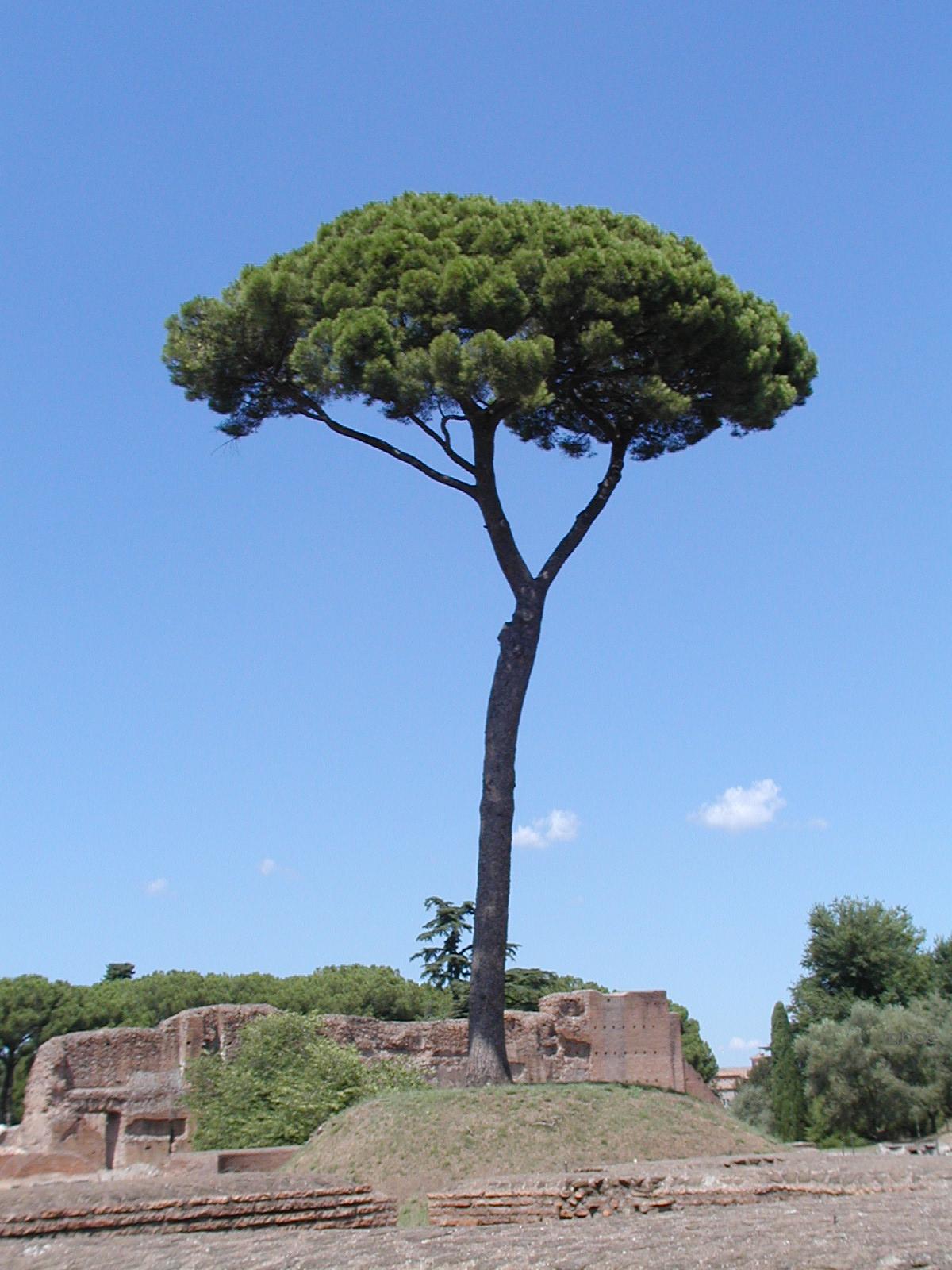 Eine typische Pinie Pinus pinea) in Rom